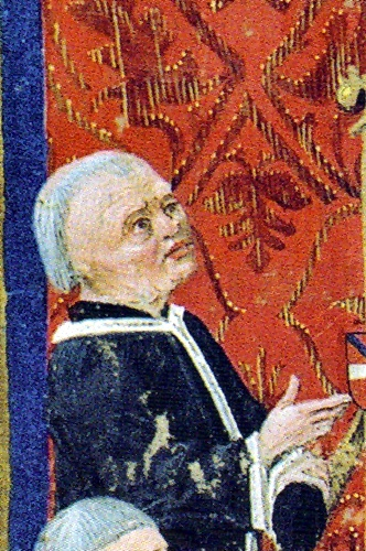 Bischof Matthias von Rammung, Speyer (1417-1478), als kurpfälzischer Kanzler, mit schwarzem Talar und Tonsur. Bildausschnitt aus dem Lehenbuch des Pfalzgrafen Friedrich I.